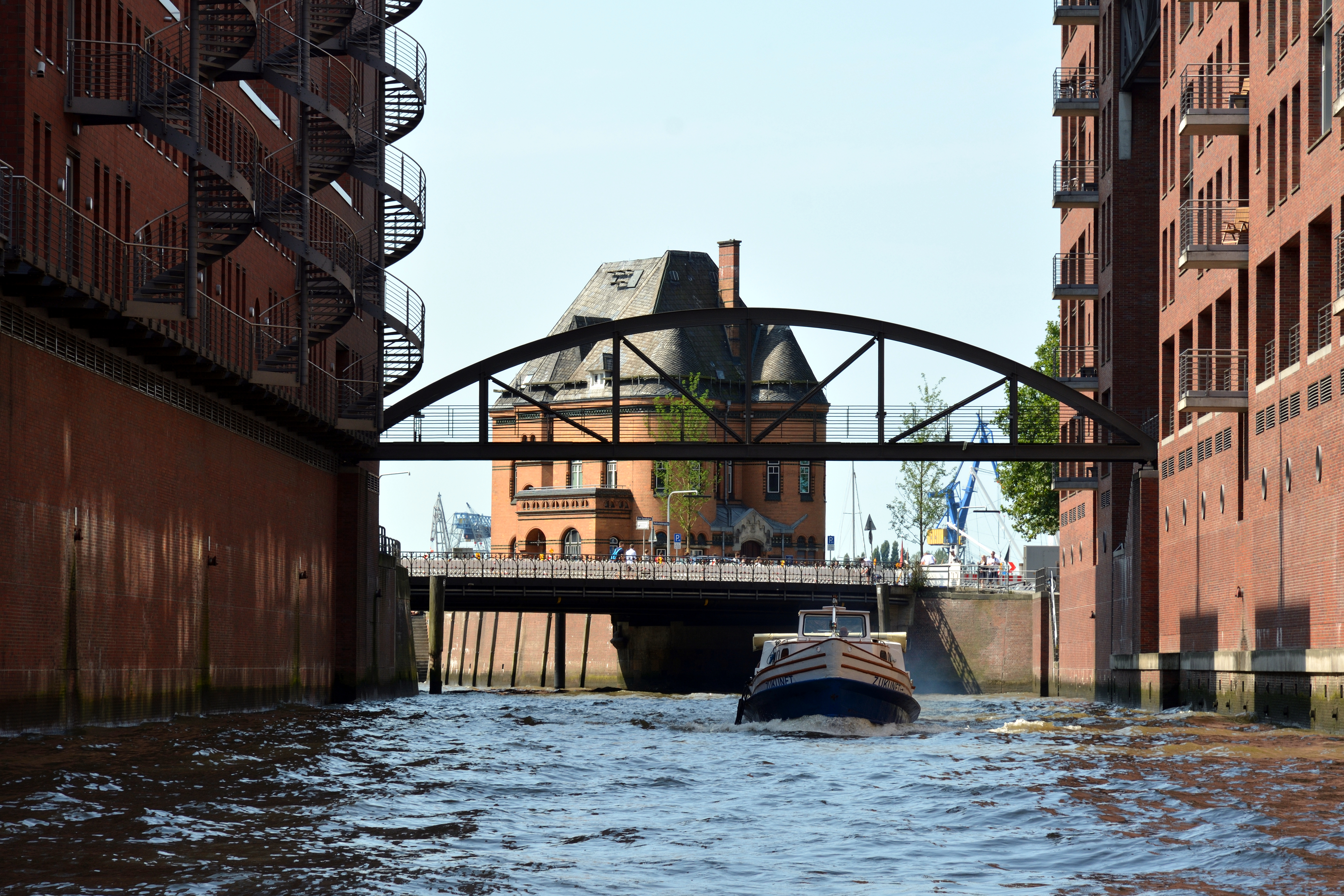 Impressionen einer Barkassenfahrt im August 2016 durch den Hamburger Hafen.